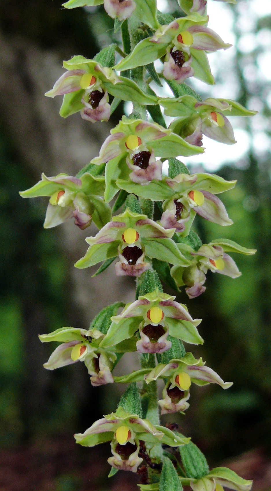 Epipactis helleborine, Schwäbisch-Fränkische Waldberge, Germany